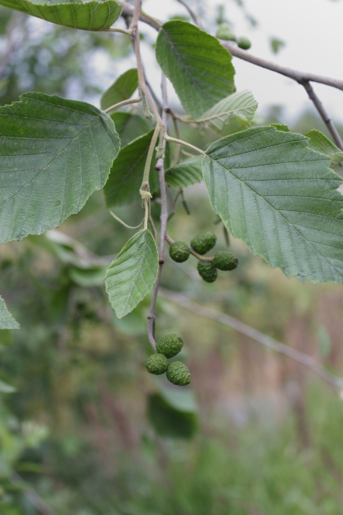 Черная ольха (Alnus glutinosa) из южных предместий Санкт-Петербурга